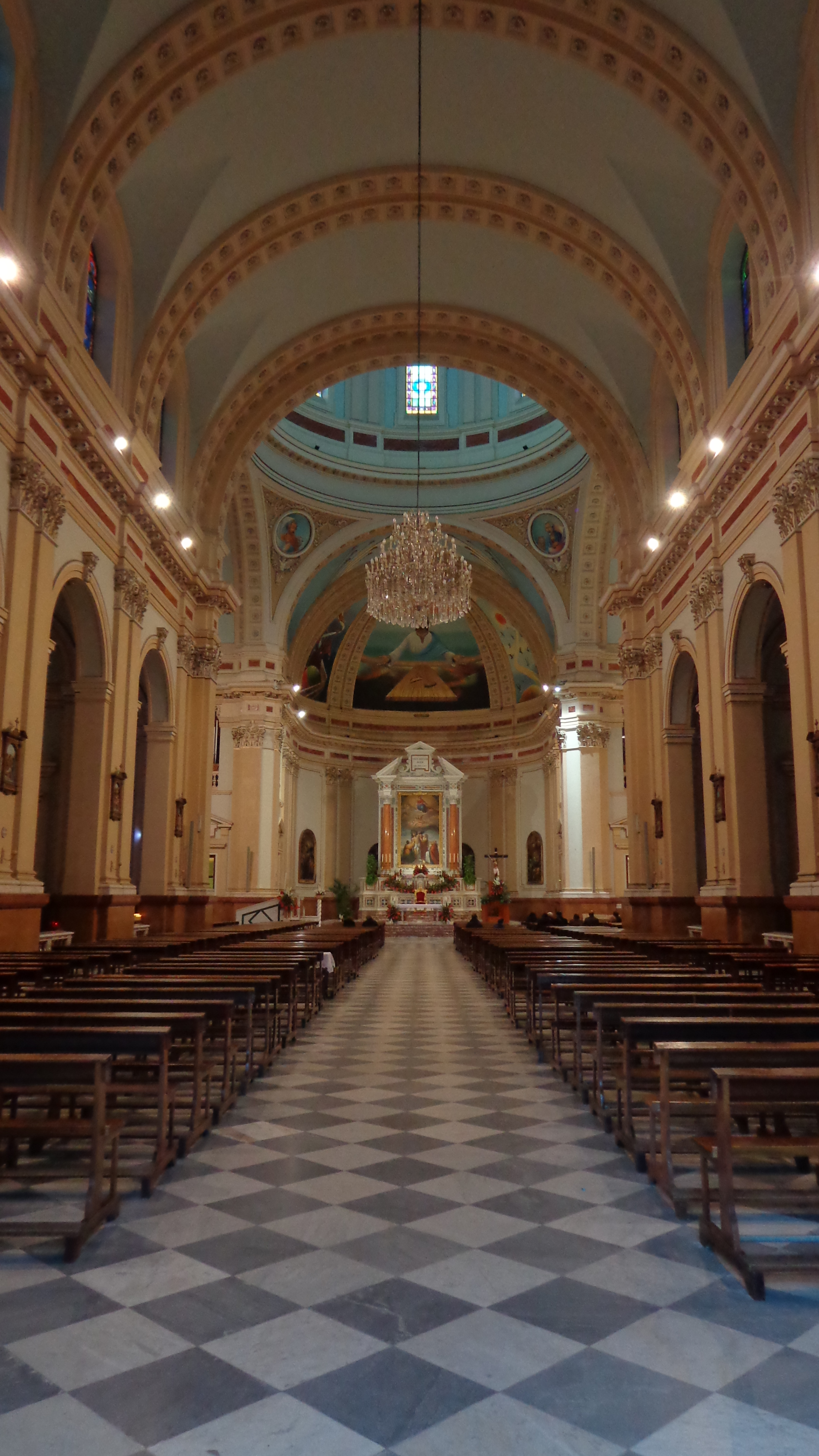 Veduta navata principale